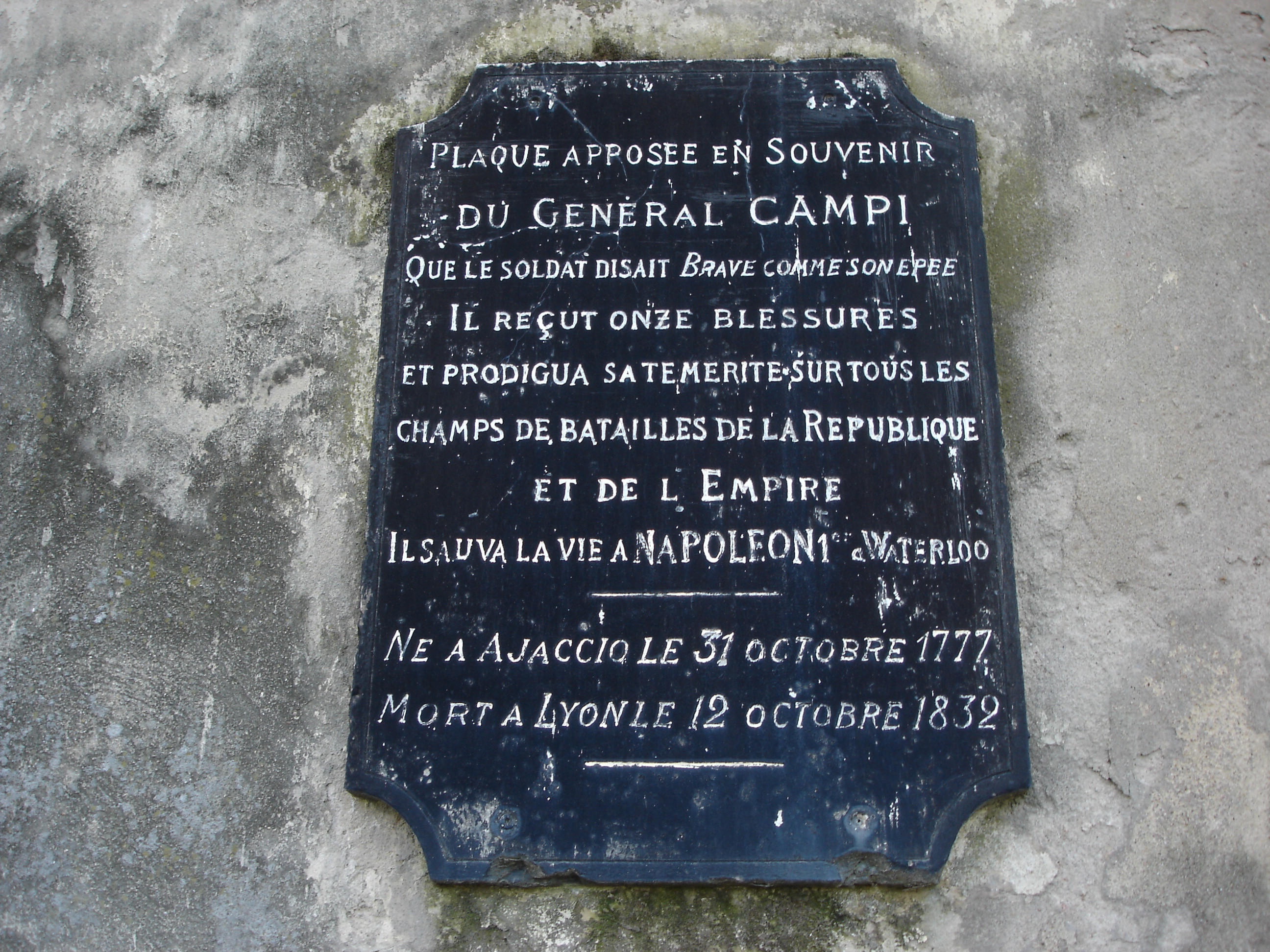 Plaque commémorative en souvenir de Toussaint Campi, général de division, situé sur le fort La Motte dans le 7e arrondissement de Lyon.